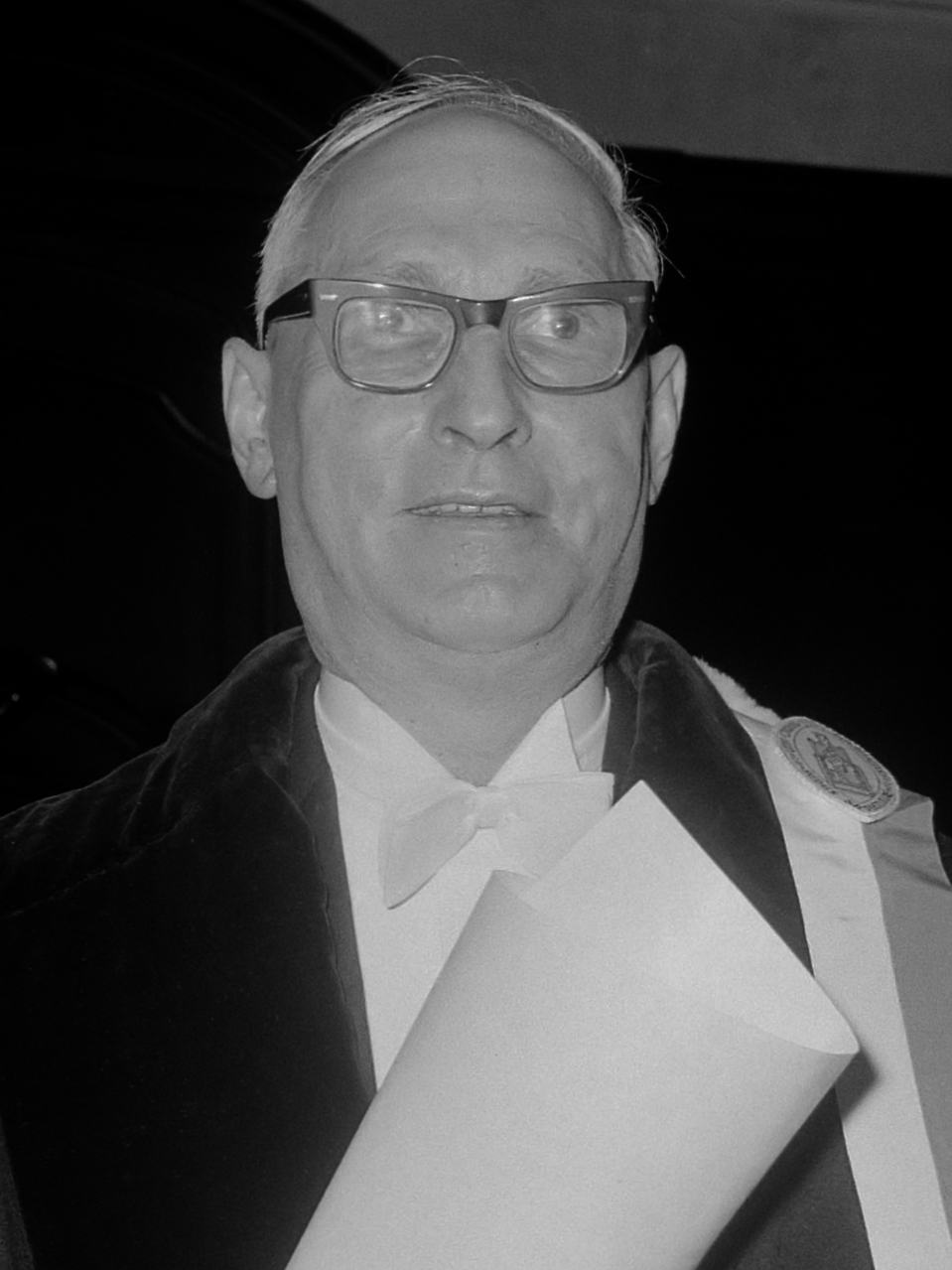 Ere-doctoraten aan de Universiteit te Leuven, waaronder de Nederlander, prof. dr. W.A.P. Smit 2 februari 1966